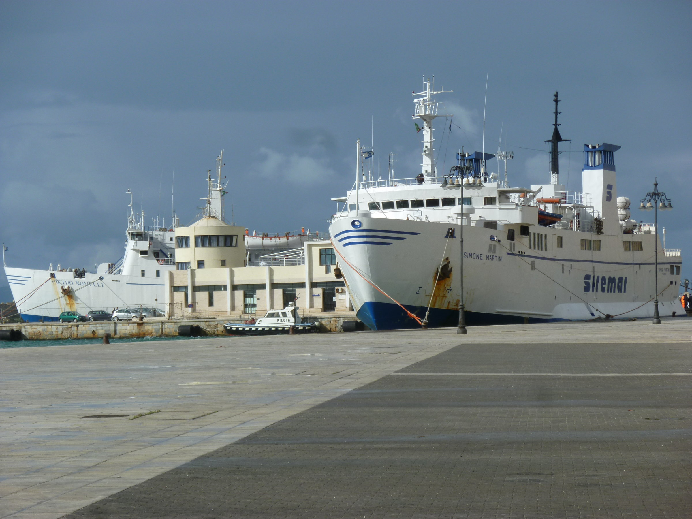 Il traghetto Simone Martini attraccato al porto di Trapani. Sullo sfondo la prua del Pietro Novelli